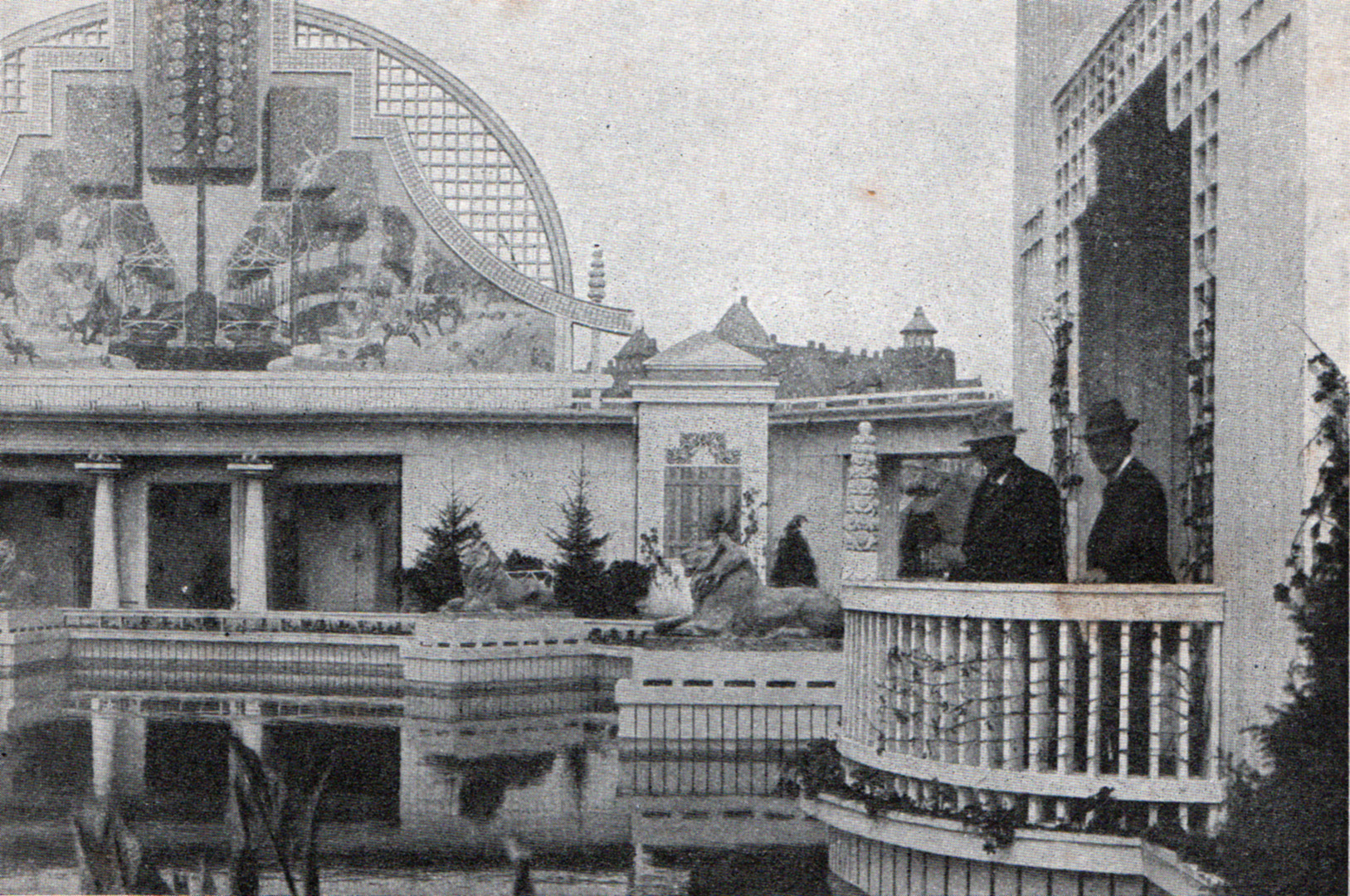 Gavlen af bygningen med havebrugsudstillingen på Landsudstillingen i Århus 1909. Arkitekten Anton Rosen står på balkonen.